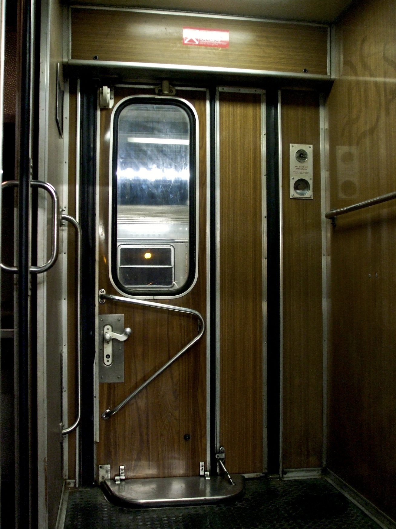 pormenor do interior da Unidade Tripla Diesel. Tipo: Comboio Regional 5729 [Faro - Vila Real de Santo António] Local: Estação de Faro [Linha do Algarve, PK 340] Data e hora: 20 de Fevereiro de 2006 [21h12] Material: Automotora 0619 [Unidade Tripla Diesel]